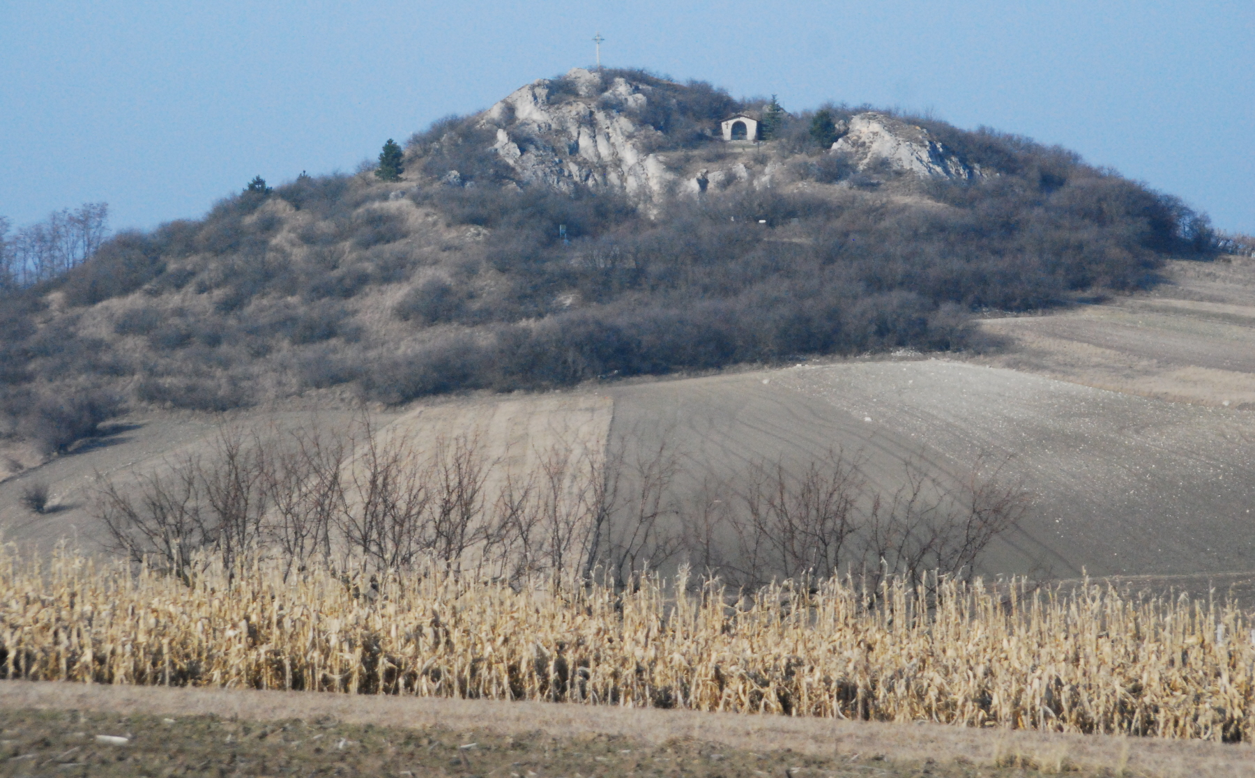 Der Schweinbarther Berg in Niederösterreich von Süden